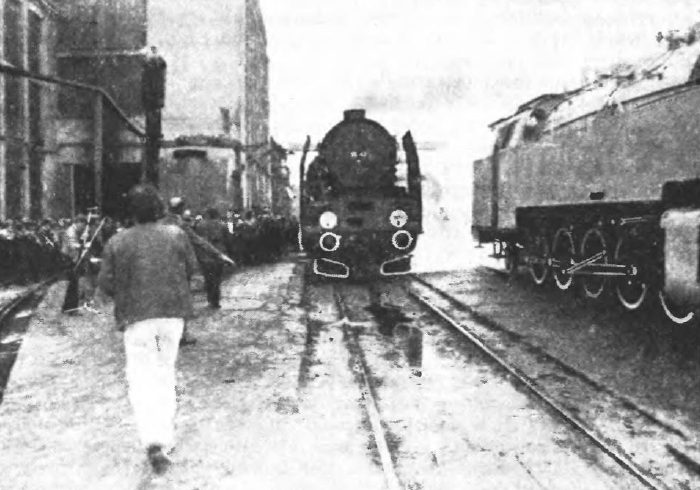 Parowóz Pt47-1 na terenie ówczesnych ZNTK Bydgoszcz, które 18 października 1985 zakończyły naprawę średnią z rewizją wewnętrzną kotła tego parowozu. Był to jeden z trzech ostatnich parowozów naprawionych przez te zakłady.